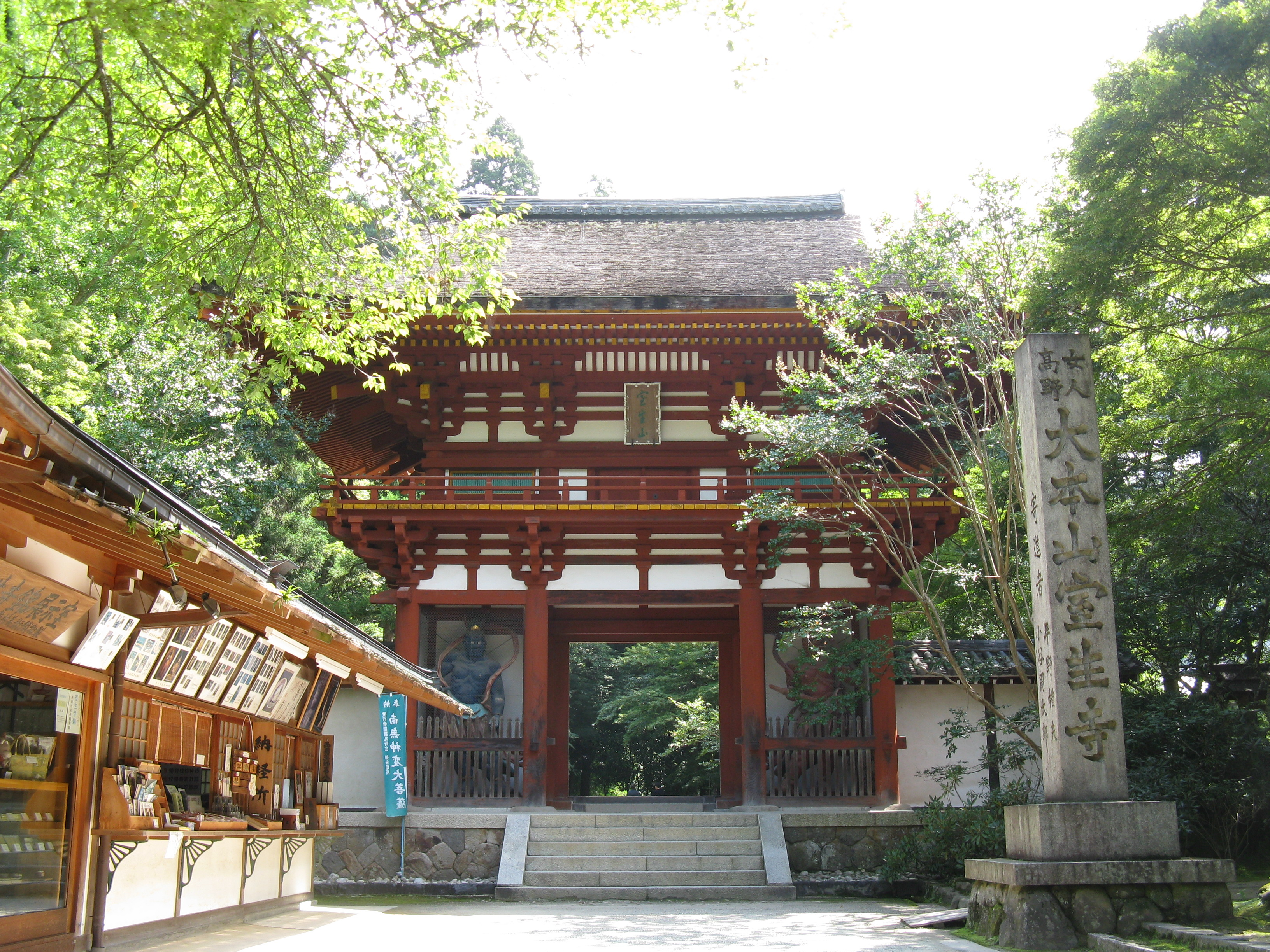 室生寺 仁王門